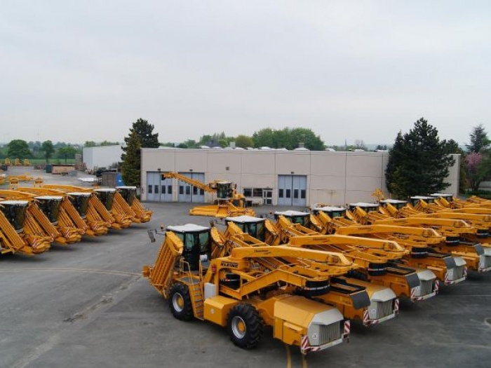 Standort der Firma Kleine in Salzkotten.